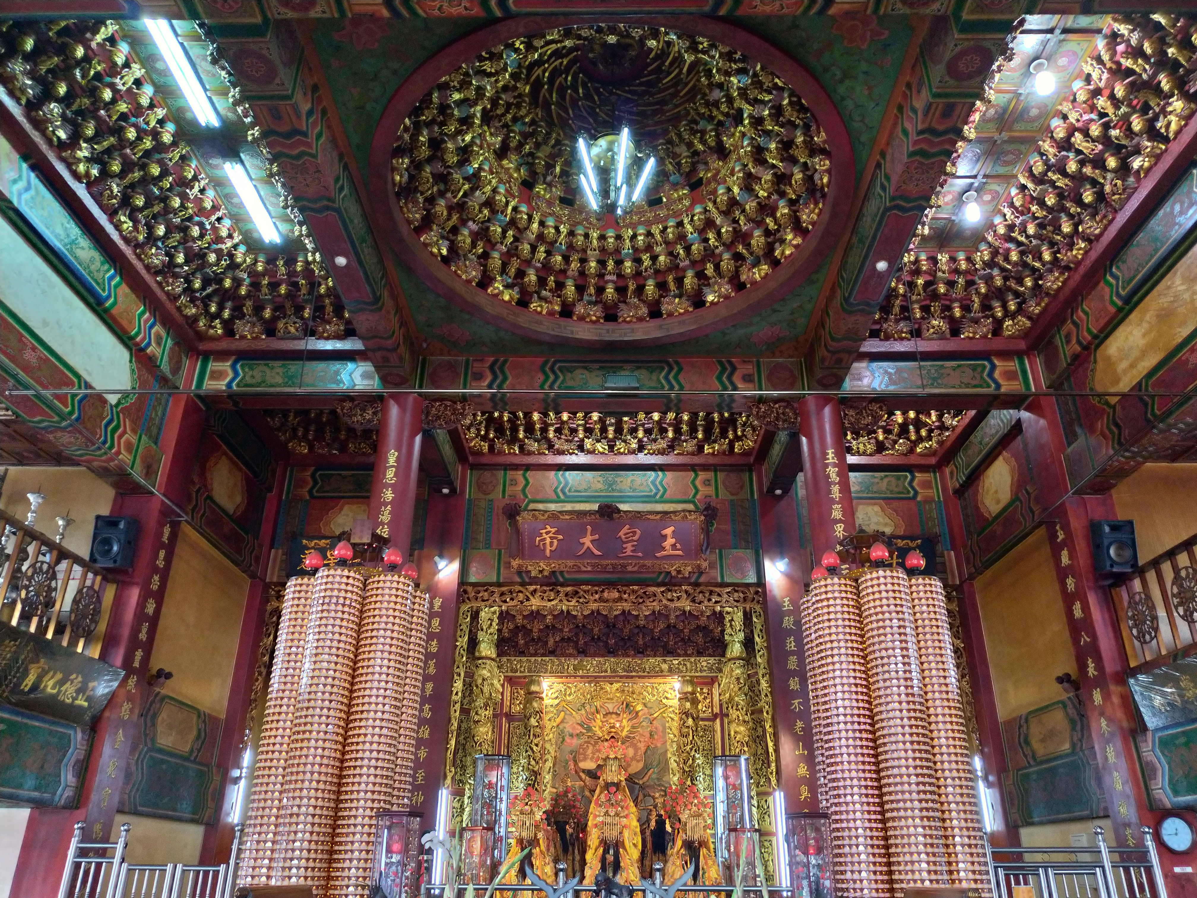 凌霄寶殿之廟頂為圓形藻井，萬仙來朝，增添凌霄寶殿的神聖感。；使用本圖片請遵循(CC 姓名標示-非商業性-禁止改作)，Please follow (CC BY-NC-ND 3.0 TW)